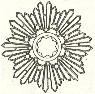 Scan van Blz. 192 van het boek "Handbuch der Ritter- und Verdienstorden " uitgegeven 1893 door Weber.Tekening van de in 1902 overleden Maximilian Gritzner. Robert Prummel 10 jul 2008 16:40 (CEST)